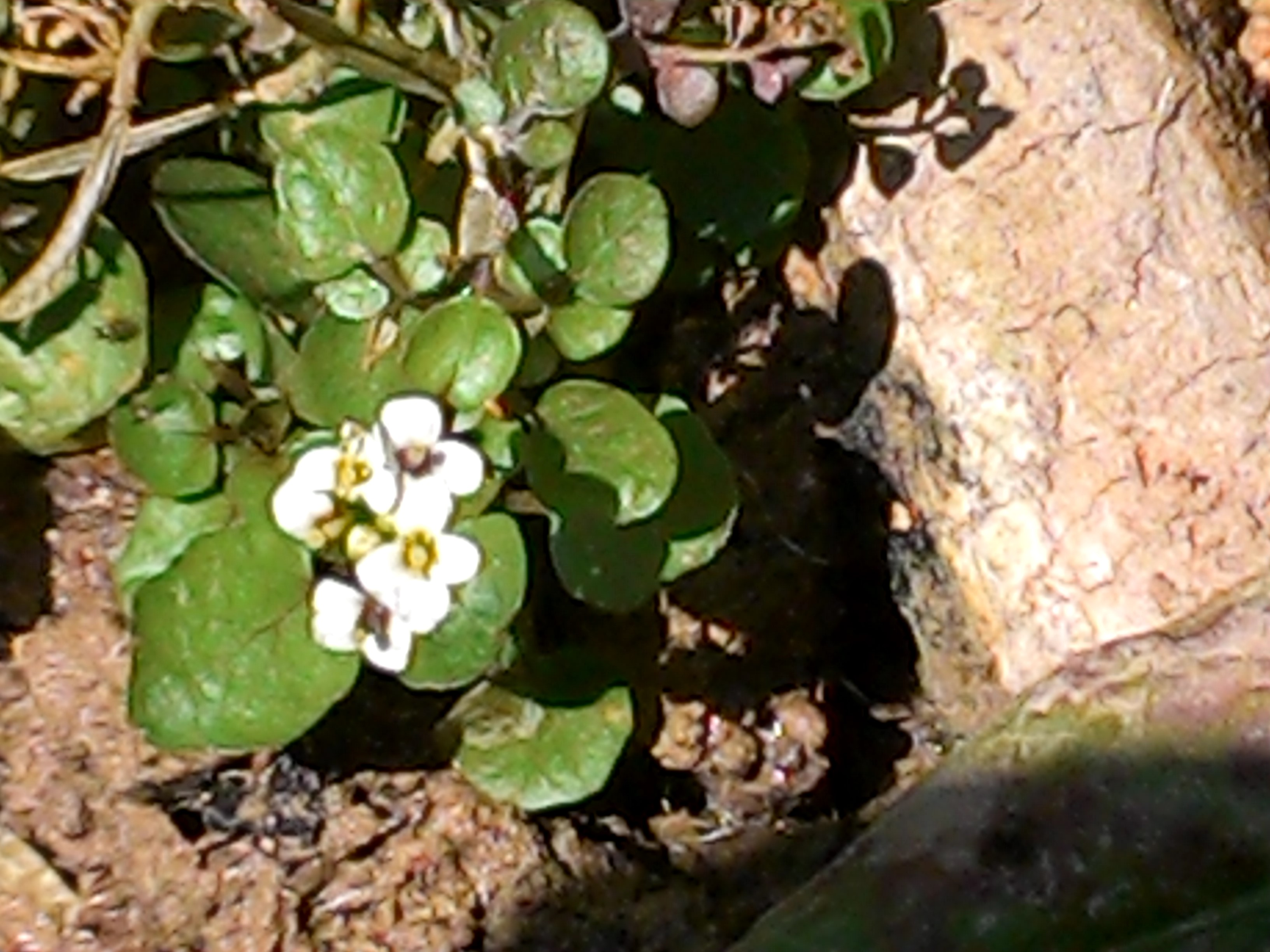 כרפס הביצות-צילם מתן ממן